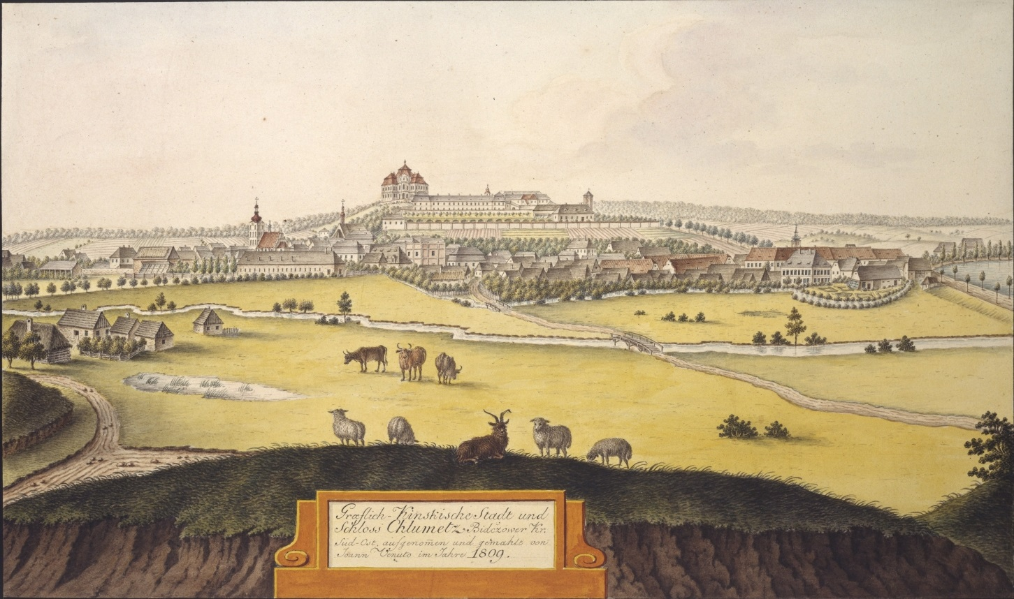 Chlumec nad Cidlinou. Graeflich-Kinskische Stadt und Schloss Chlumetz Bidczower Kr. Süd-Ost, aufgenommen und gemahlt von Joann Venuto im Jahre 1809